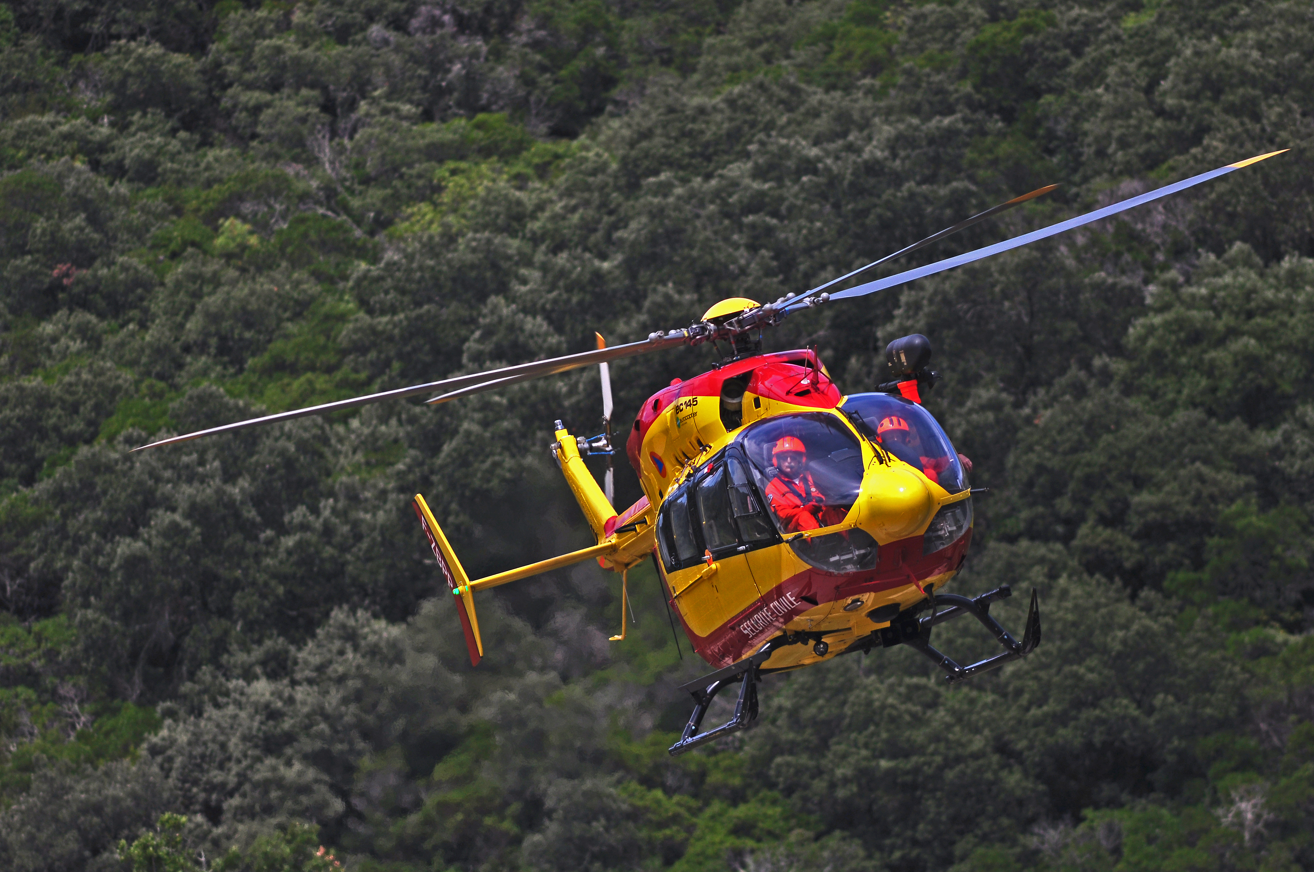 Hélicoptère EC 145 Sécurité civile, en travail dans les gorges du GARDON France.